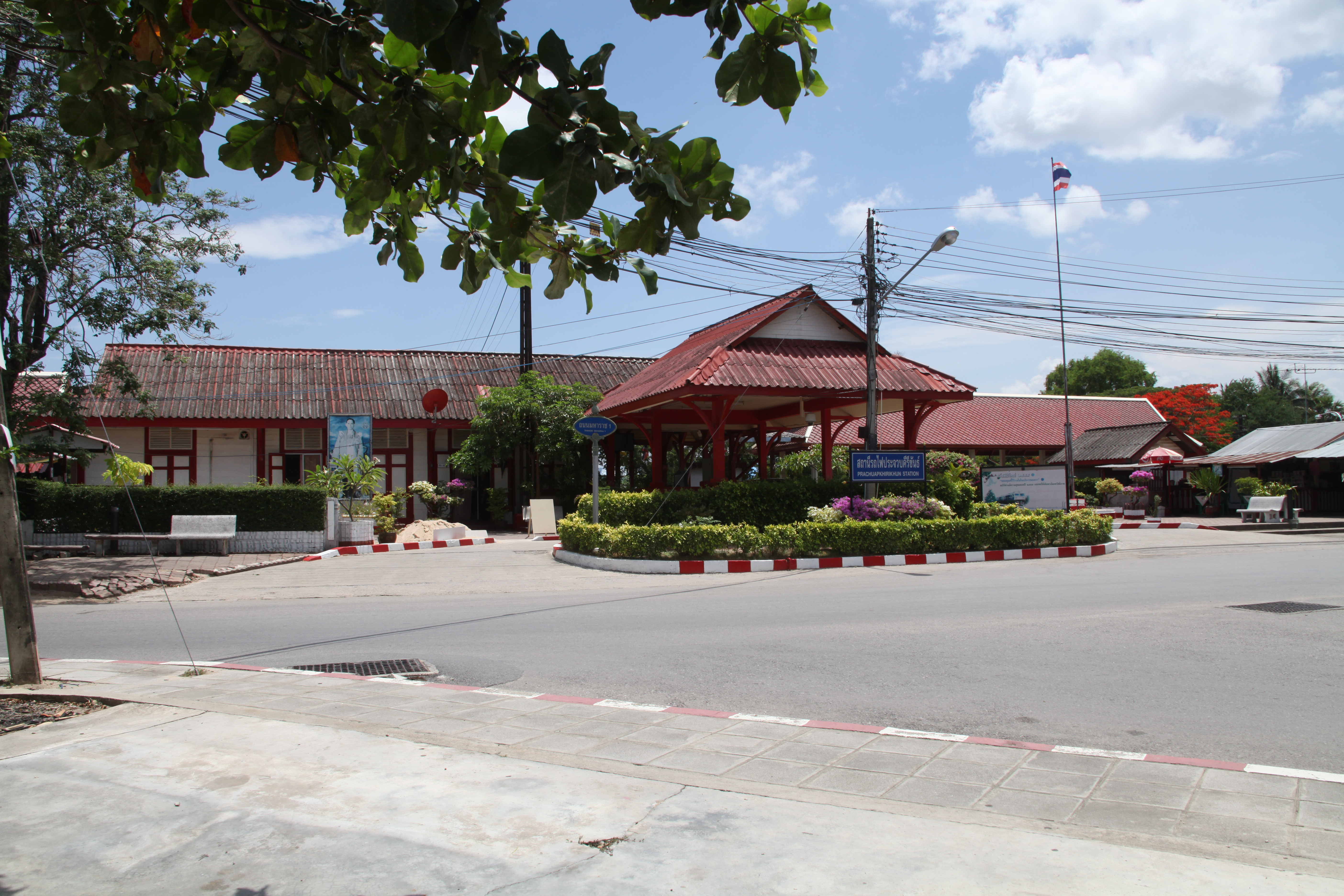 プラチュワップキーリーカン駅